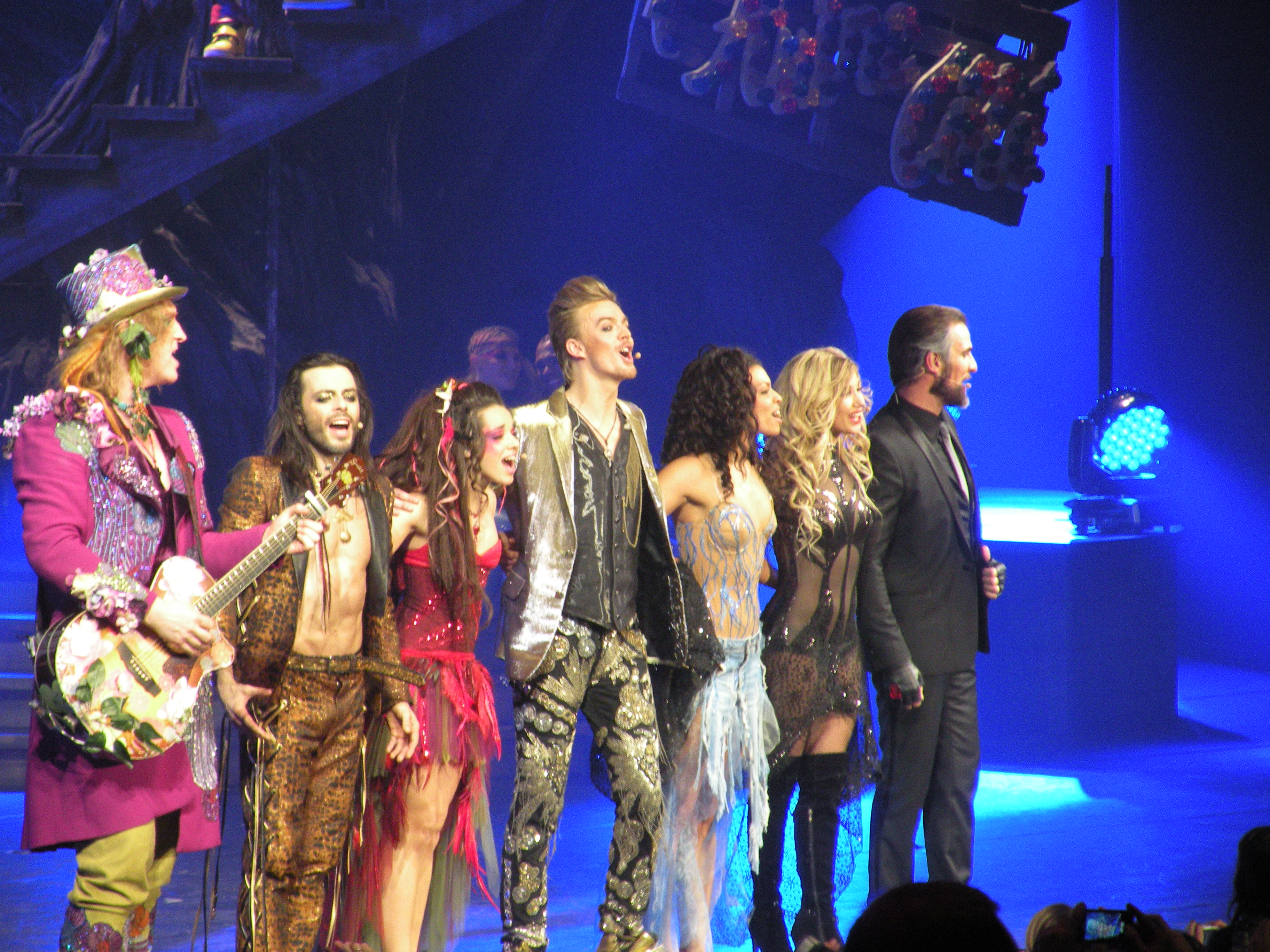 troupe d'adam et eve: de gauche à droite : Sam Stoner est Mynt, Nuno Resende est Snake, Noémie Garcia est Strawberry, Thierry Amiel est Adam, Cylia est Ève, Liza Pastor est Lilith et Solal est Solus